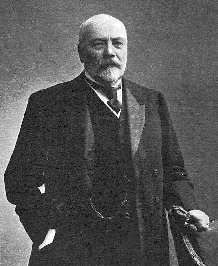 Экеспарре, Оскар Рейнгольдович фон (1839—1925)